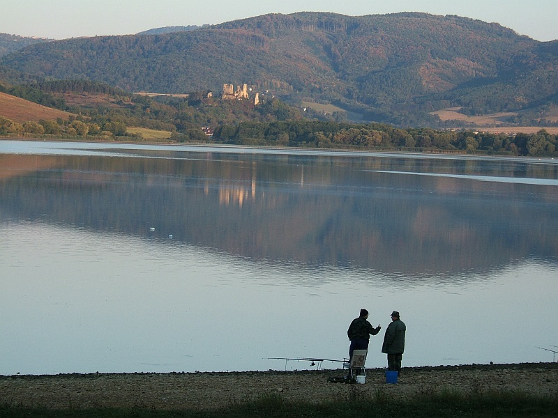 Vodná nádrž Ružiná. Hrad Divín od restaurácie Kotva